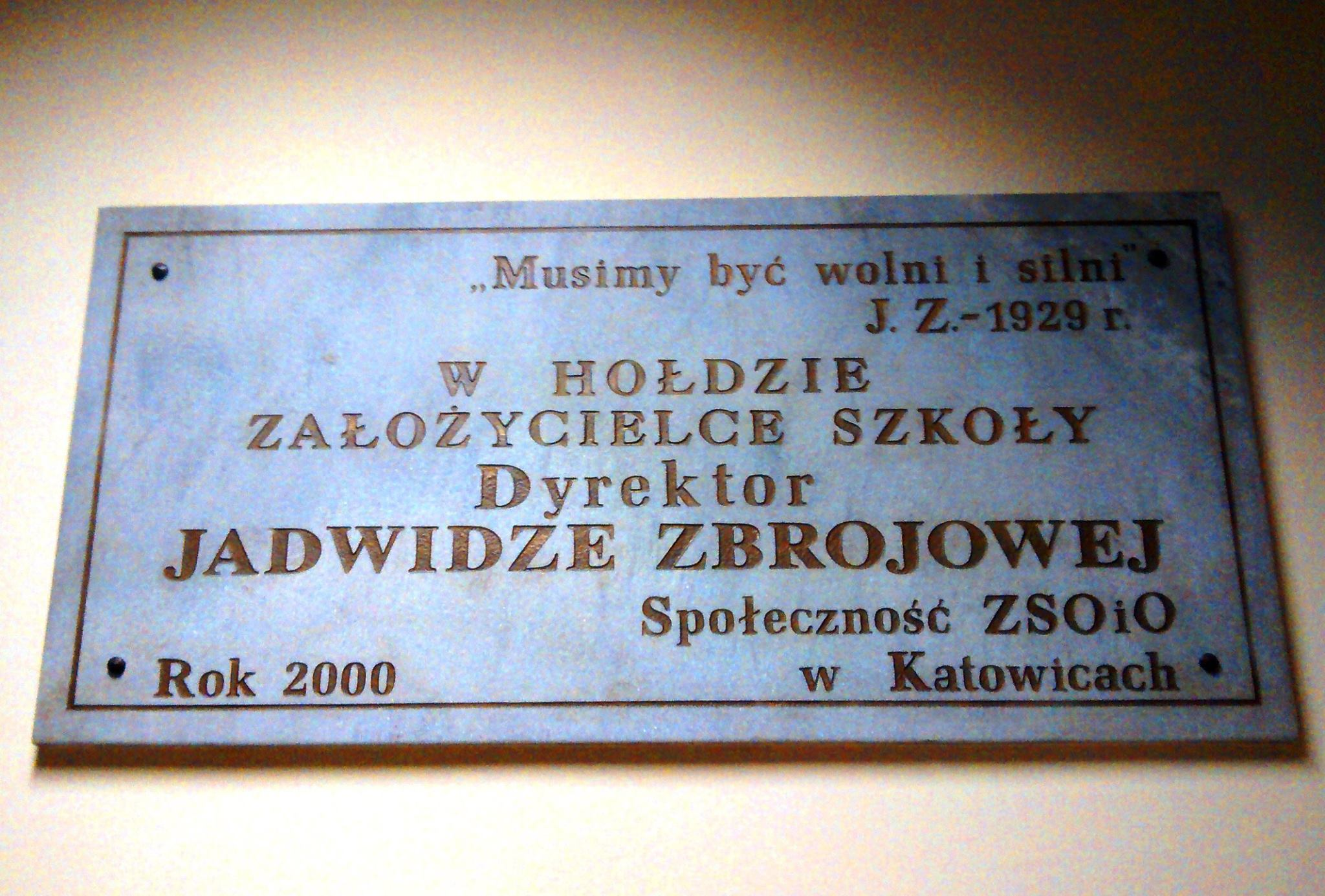 Tablica upamiętniająca Jadwigę Zbrojową, umieszczona w budynku Zespołu Szkół Budowlanych przy ul. Techników 11 w dzielnicy Dąbrówka Mała w Katowicach